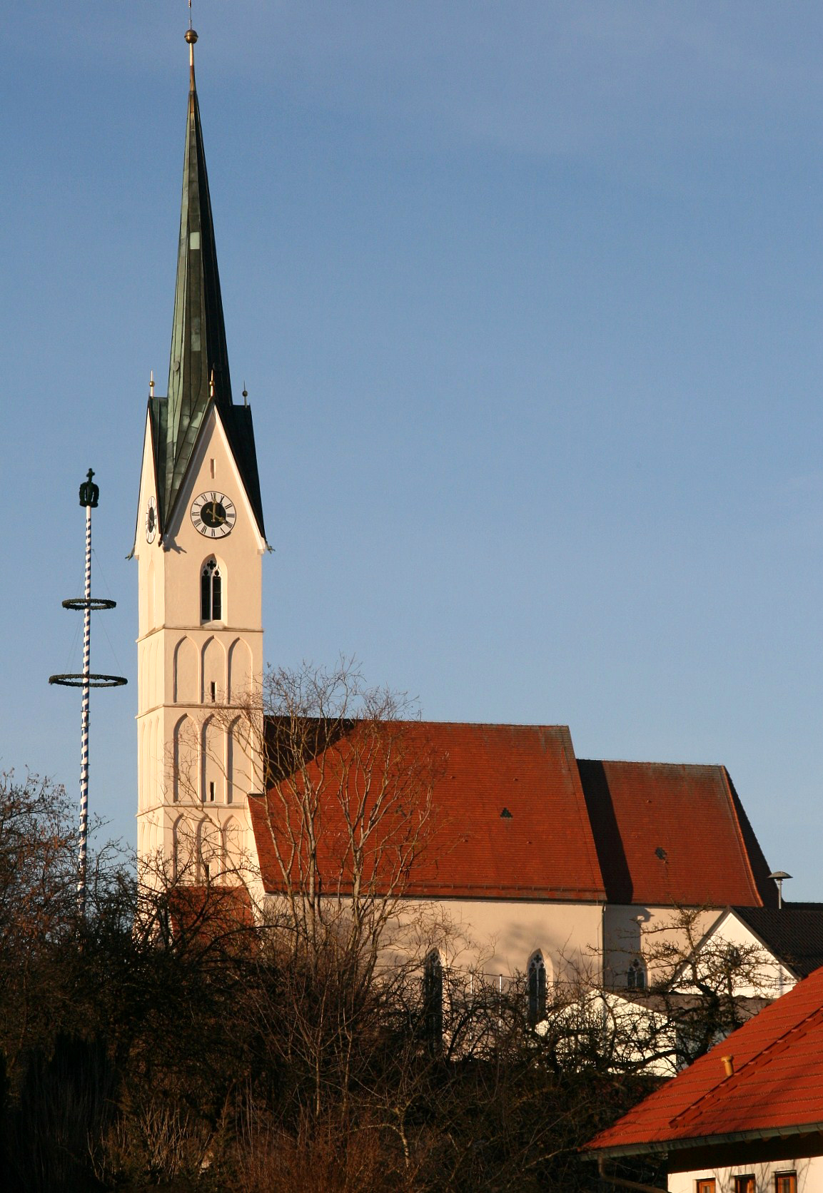 Pfarrkirche Mariä Himmelfahrt in Lohkirchen, Landkreis Mühldorf am Inn, Oberbayern.